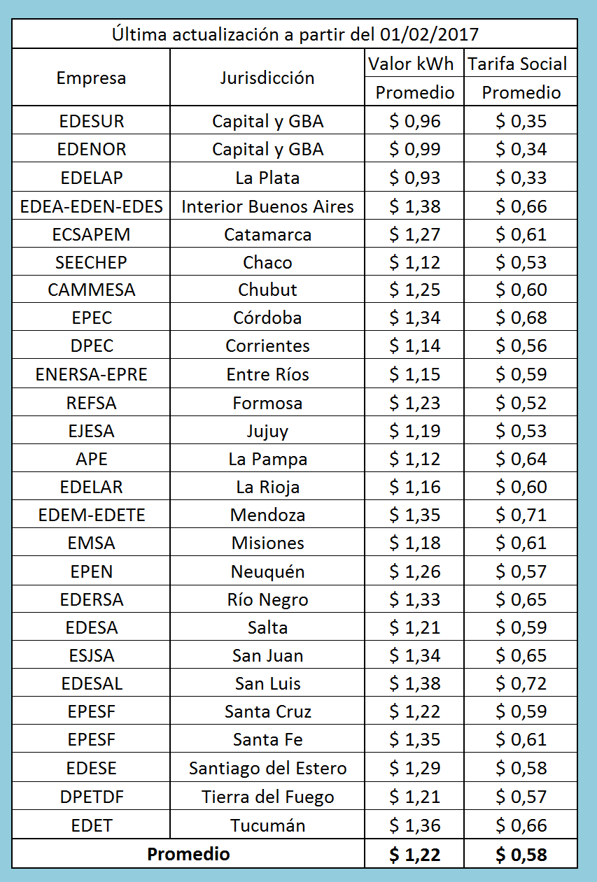 Valor de le energía eléctrica por cada kWh en cada jurisdicción de la República Argentina, para el primer semestre de 2017.